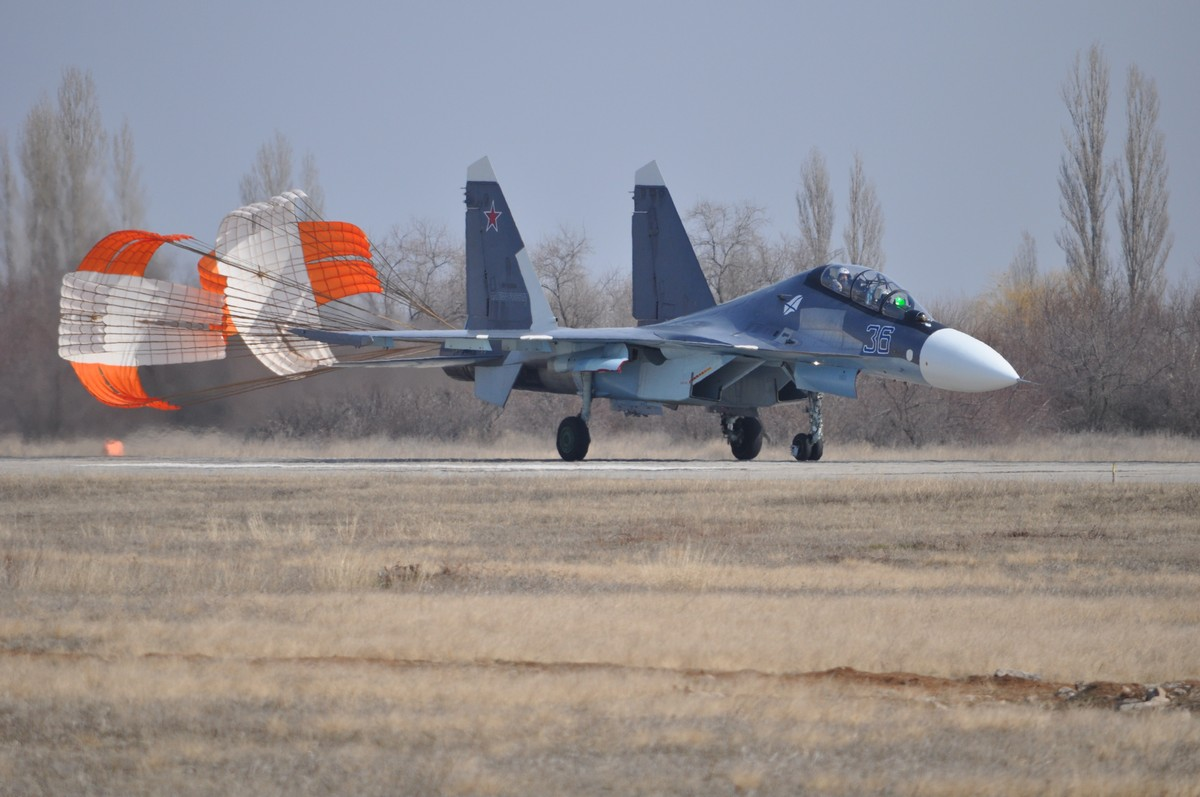 Учебные полёты экипажей многоцелевых истребителей Су-30М2 ЧФ в канун дня образования морской авиации Черноморского флота (Республика Крым).